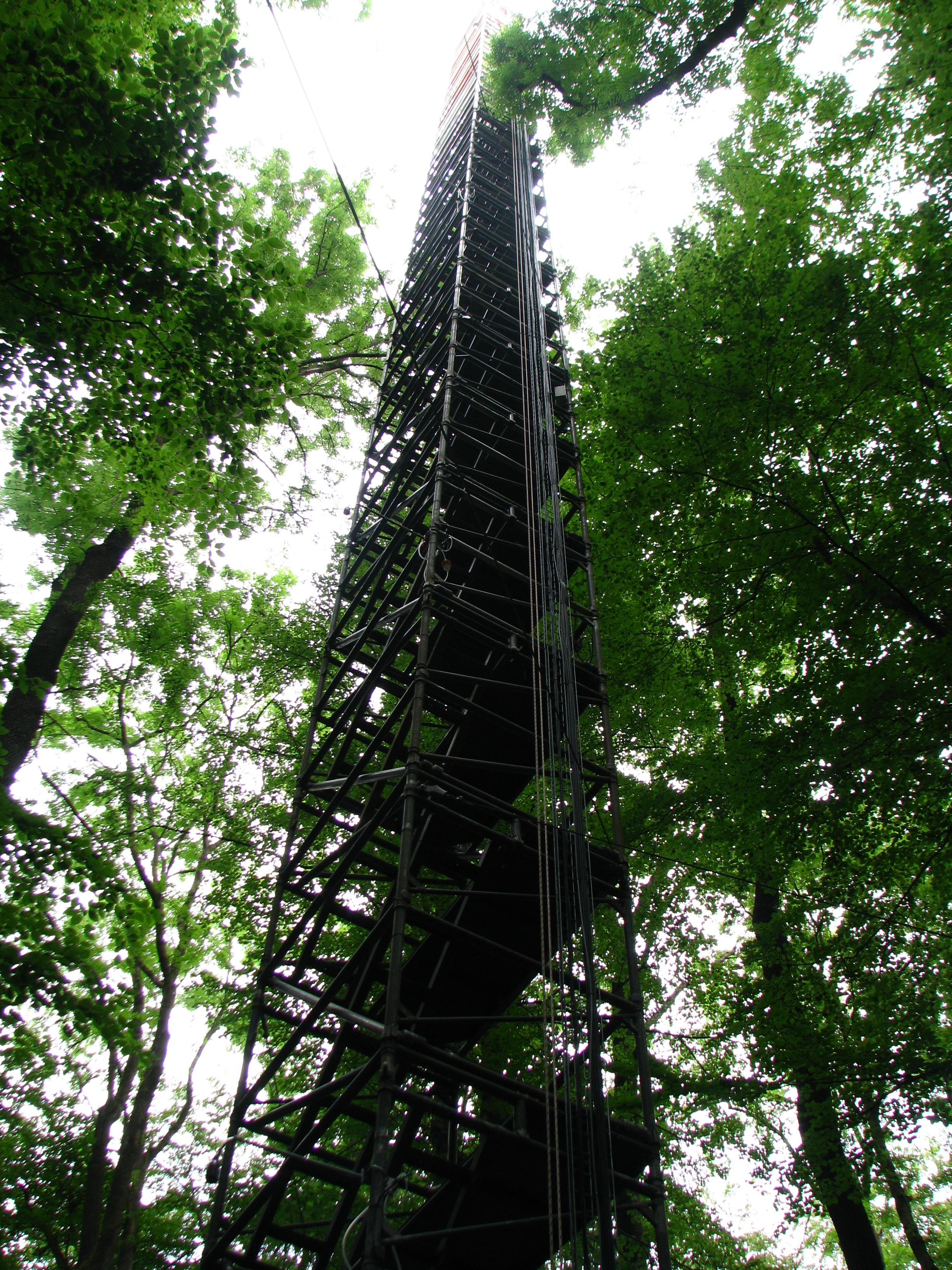 Klimamessturm des Max Planck-Institutes für Biogeochemie (Jena) im Weberstedter Holz (Nationalpark Hainich).